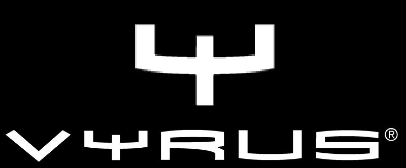 Logo della Vyrus Divisione Motori S.r.l. (Vyrus) con sede legale in Cerasolo Ausa, Comune di Coriano (RN) - Italia